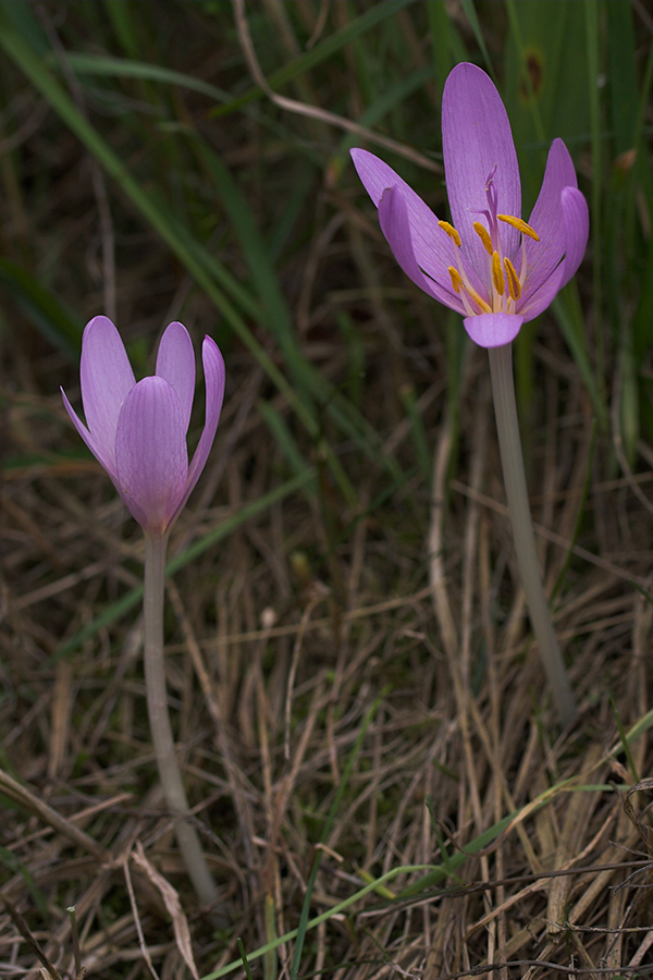 Colchicum autumnale - Herbstzeitlose